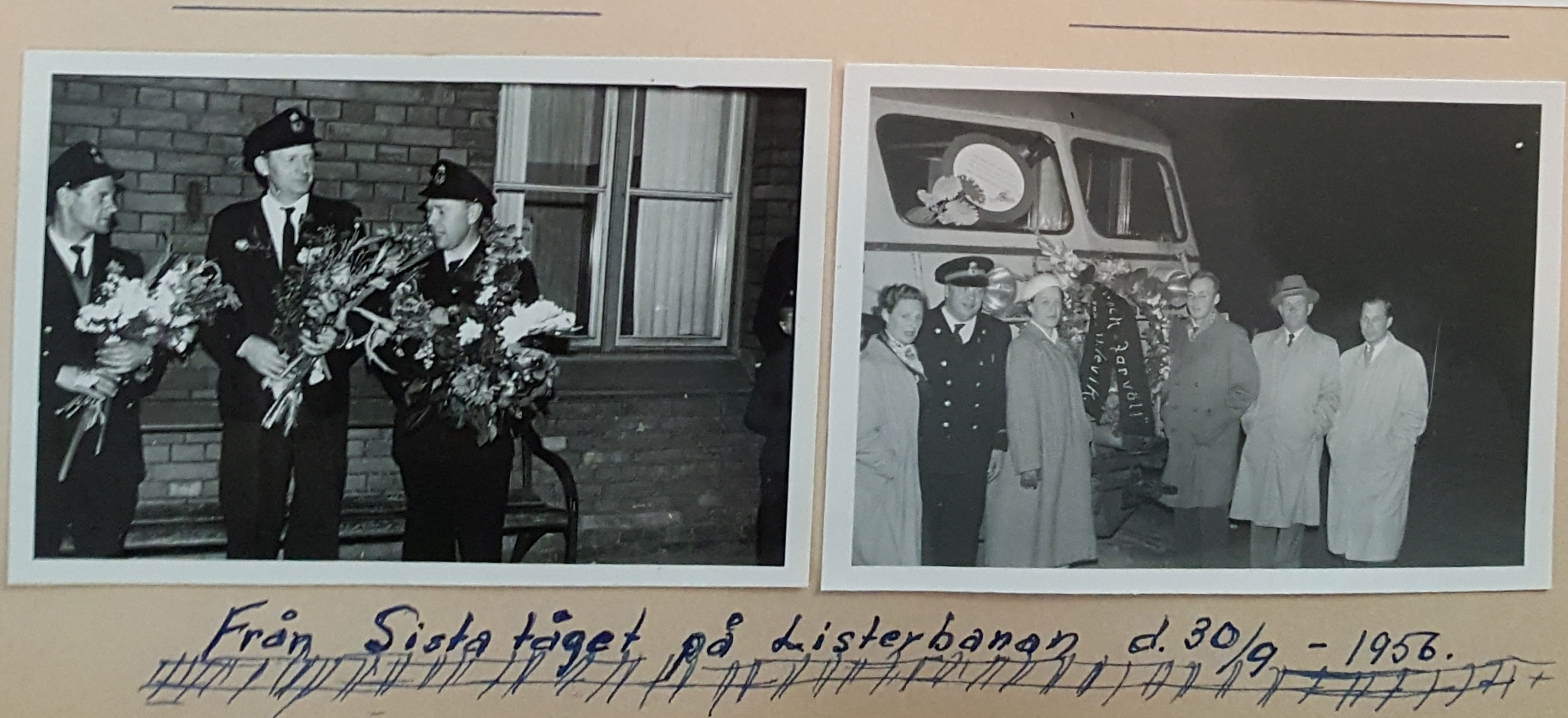 Från sista tåget på Listerbanan 1956-09-30. Ur privat fotoalbum.